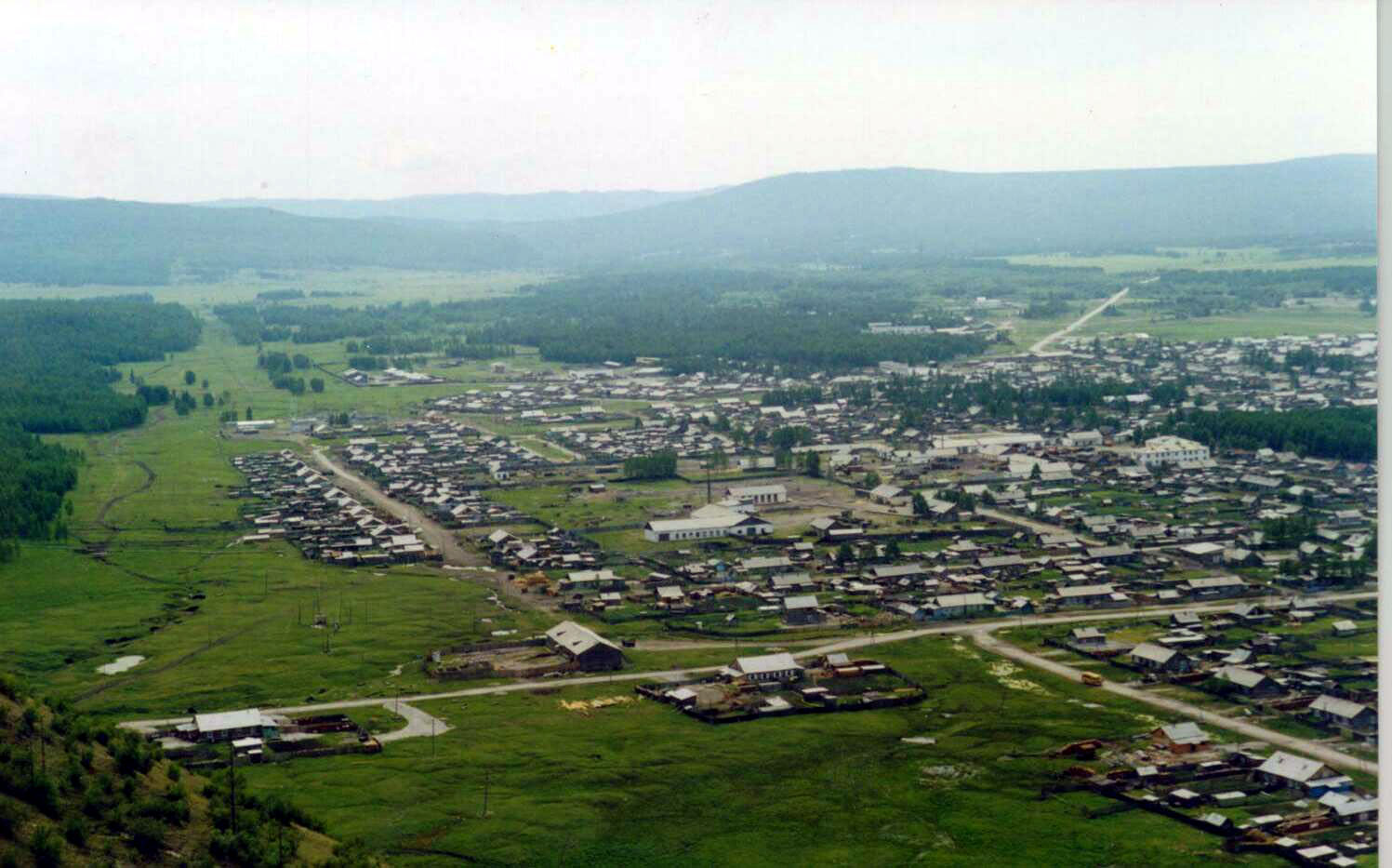 Bagdarin